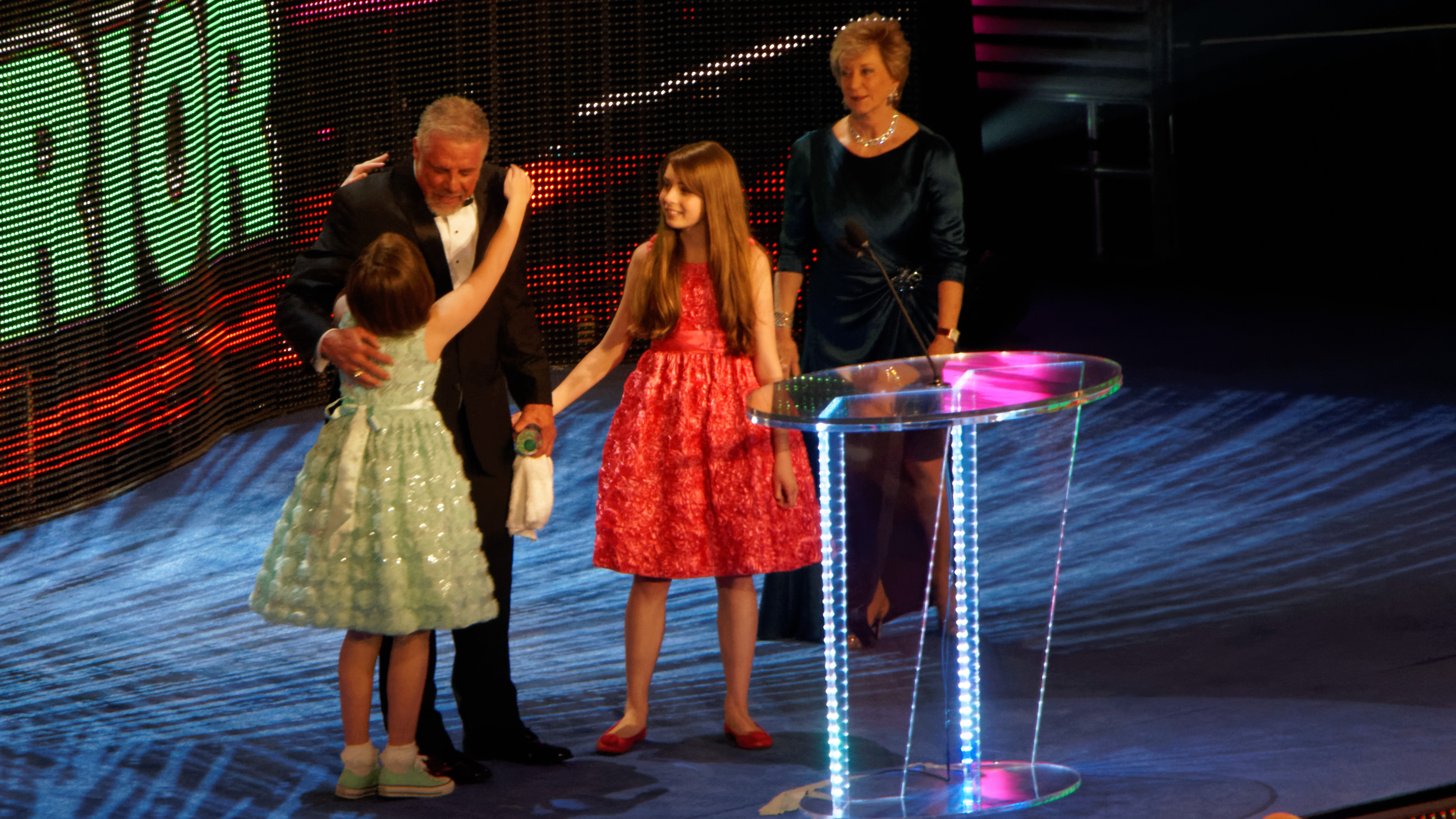 2014-04-05_22-50-20_NEX-6_8900_DxO